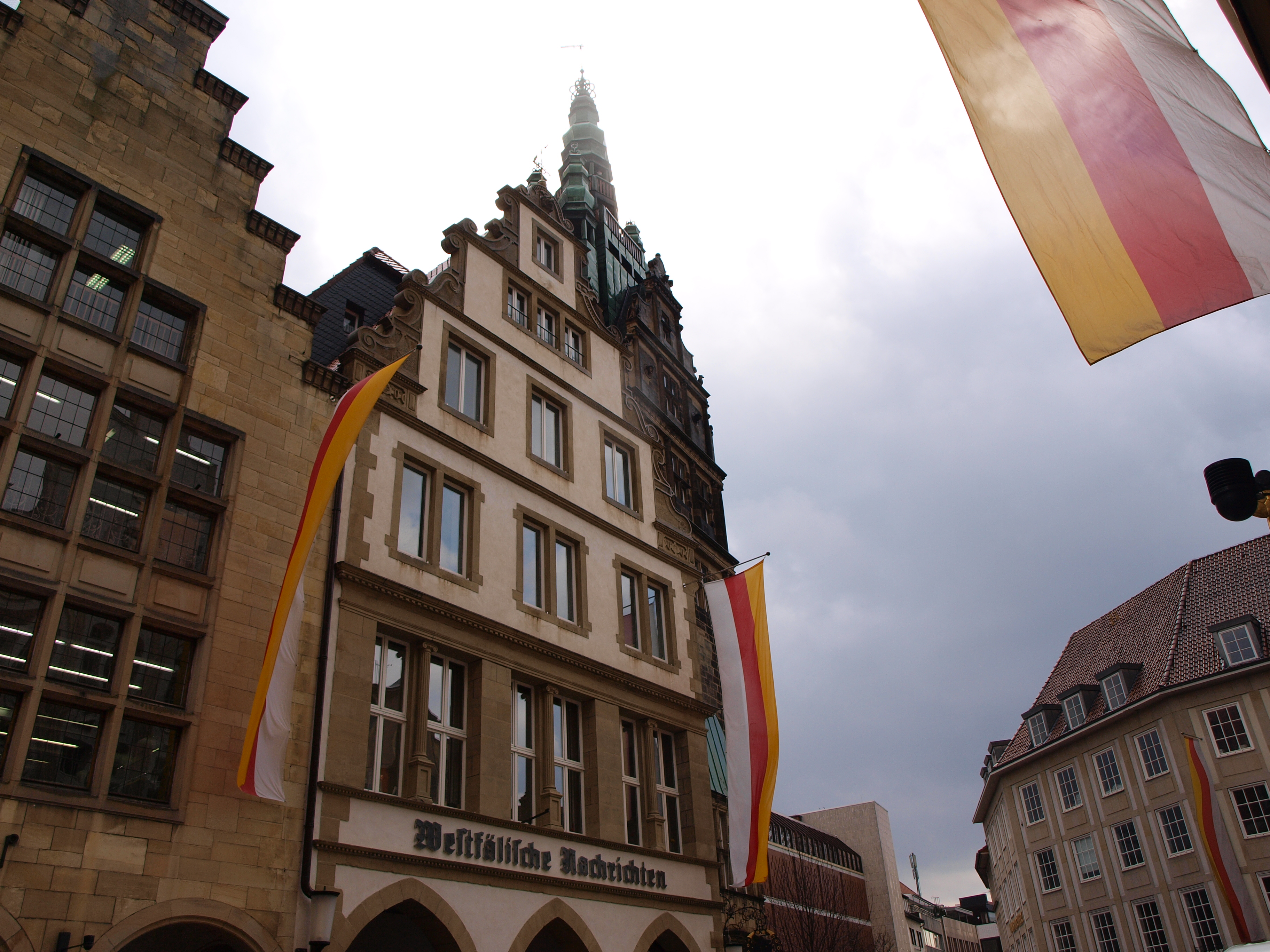 Ladengeschäft der Westfälischen Nachrichten in Münster